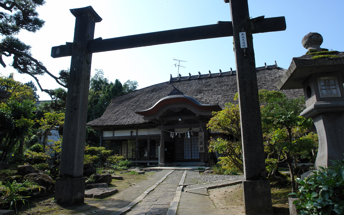 大進坊（羽黒山宿坊）